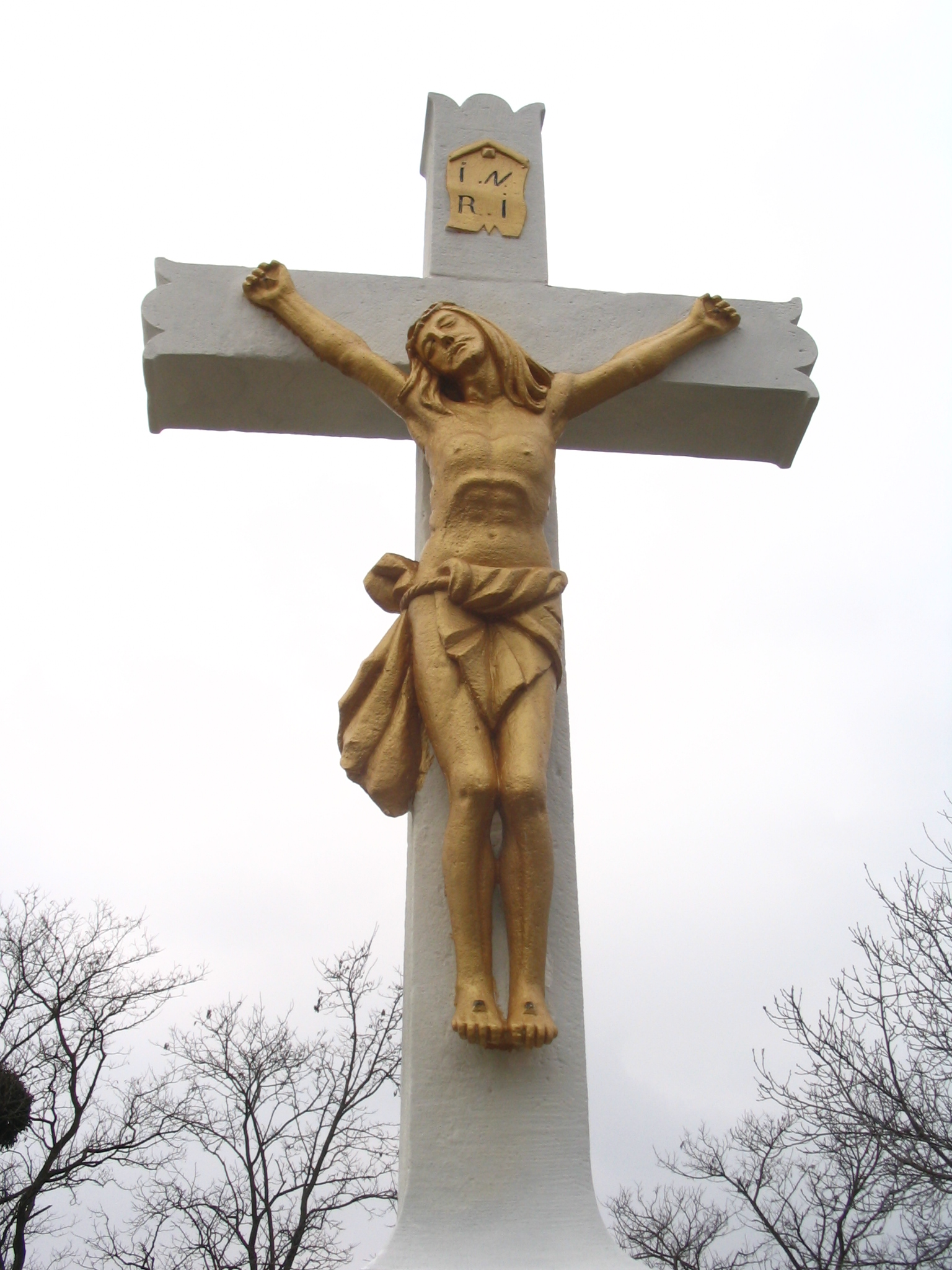 Temetőközponti kőkereszt, rajta két dátum: 1855, 1938. (felújítva 2005-ben) (Kisszőlős, Veszprém megye)